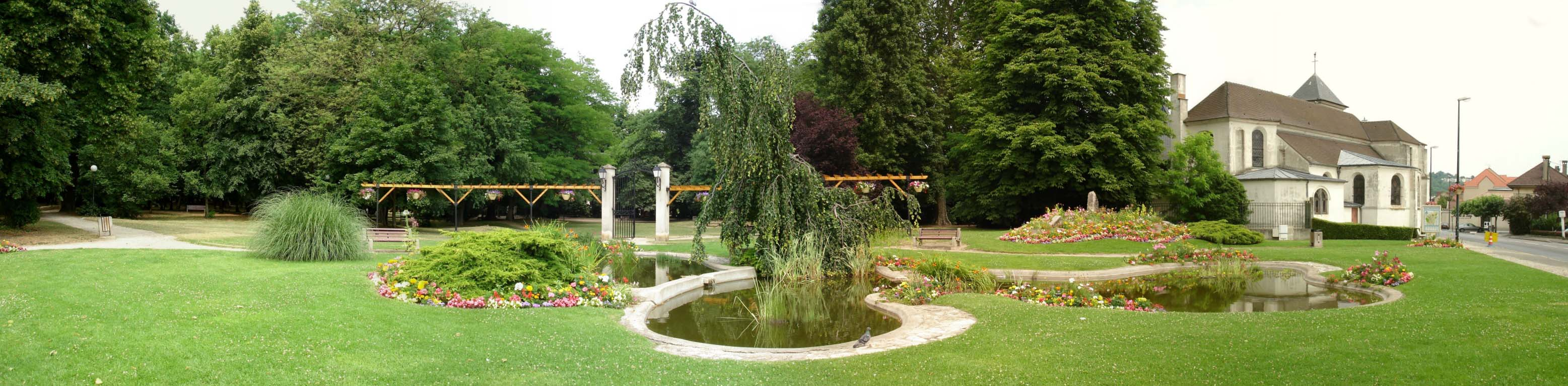 Panoramique de l'église de Soisy-sous-Montmorency, Val-d'Oise (France) - Juillet 2006 Photo personnelle de clicsouris